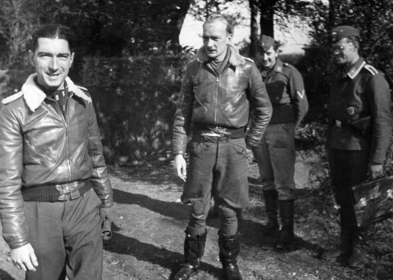 Werner Mölders Oberstleutnant Werner Mölders (links) mit Oberleutnant Georg Claus (mitte) und Angehörigen der Luftwaffe Abgebildete Personen: Mölders, Werner: Oberst, Ritterkreuz (RK), Luftwaffe, Deutschland (GND 11858300X)